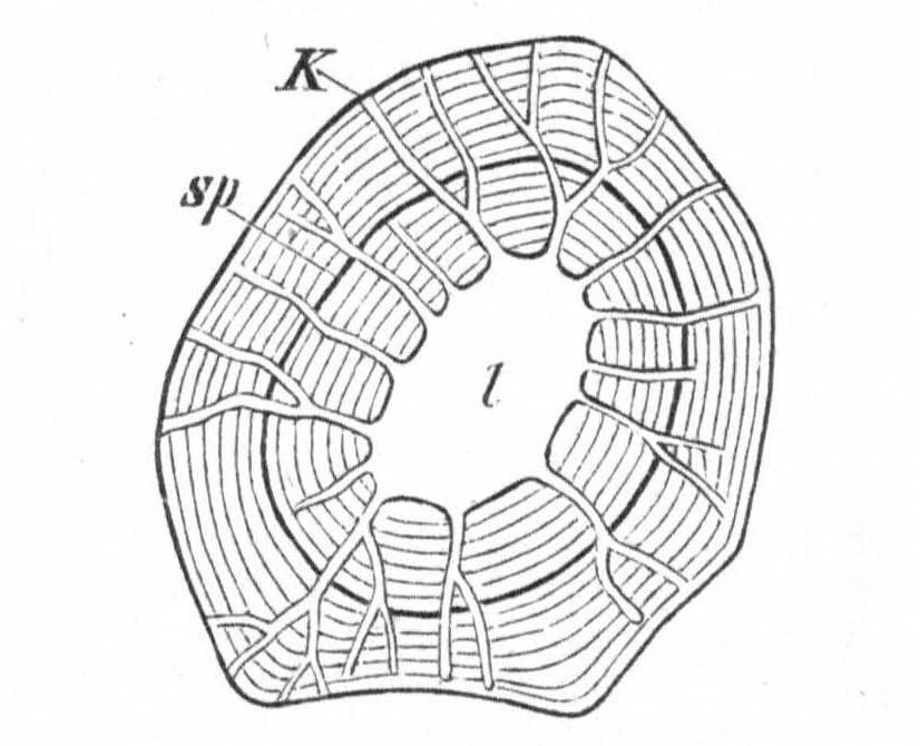 Querschnitt einer Sklerenchymzelle aus der Knolle von Dahlia variabilis. l = Zellhöhlung, K = Tüpfelkanäle, sp = Sprung im Schichtensystem.